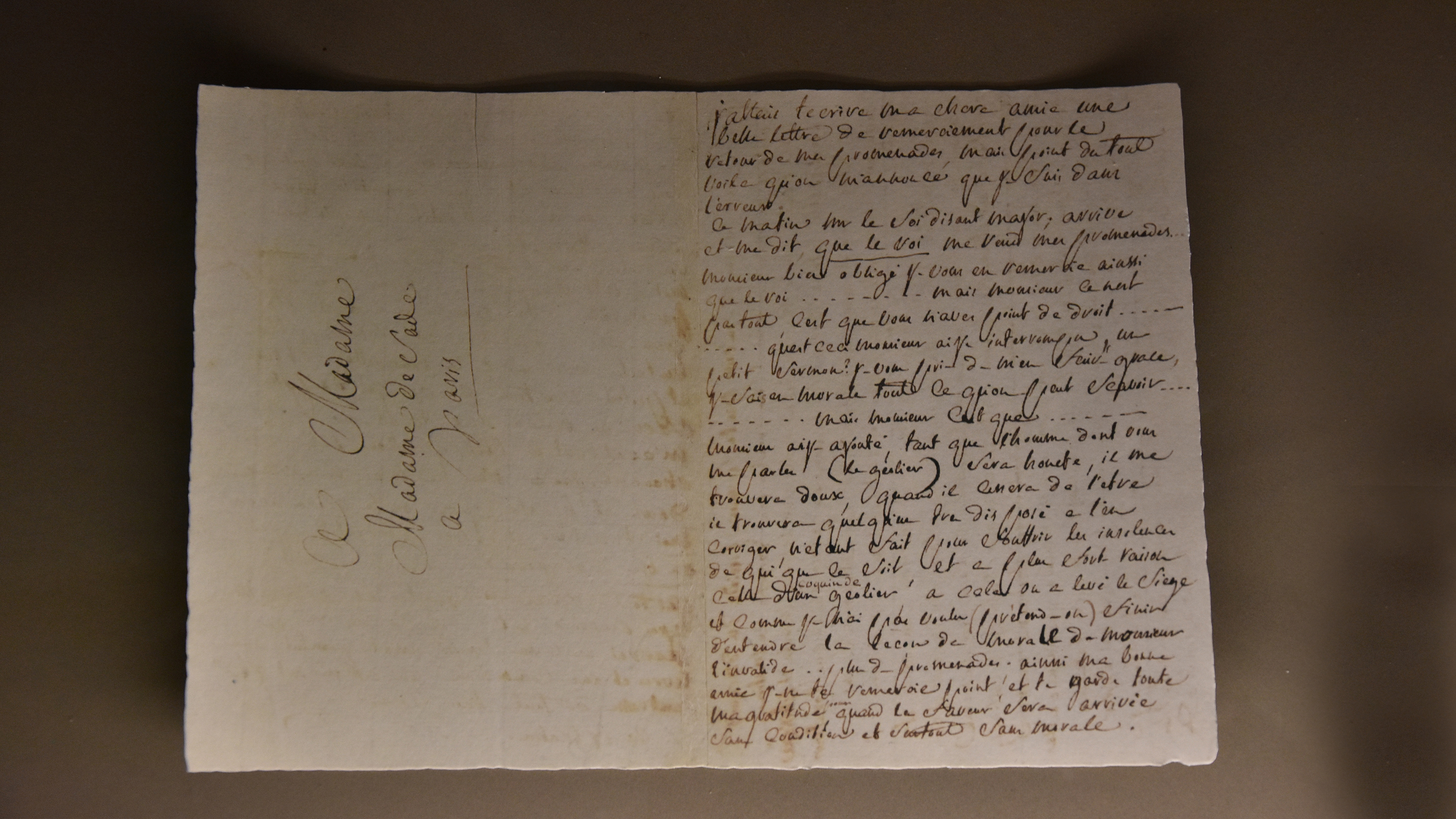 Kopie brief markies de Sade Kasteel van Vincennes 27-02-2019